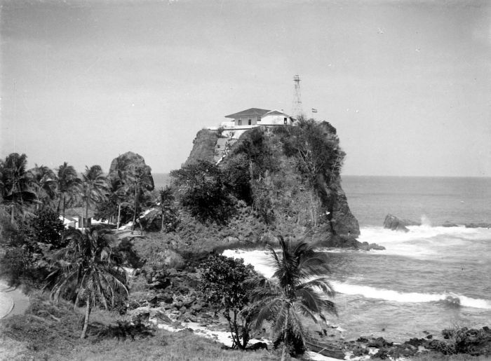 Negatief. De vuurtoren op Java's Eerste Punt